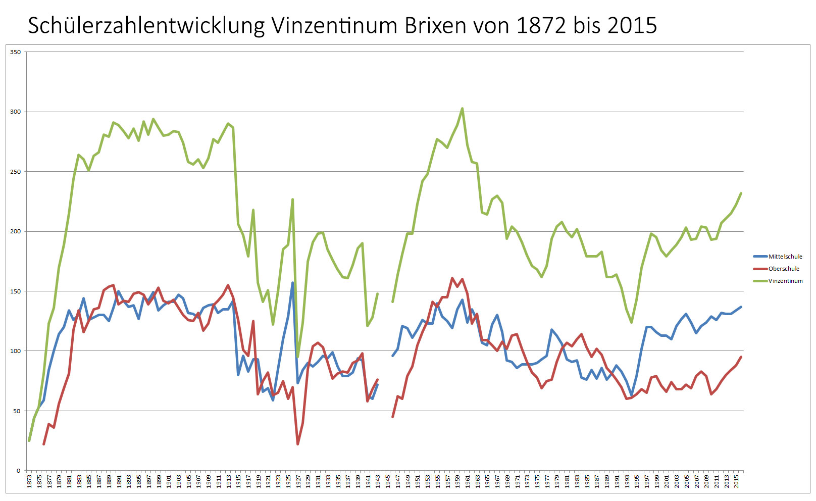 Schülerzahlentwicklung Vinzentinum Brixen von 1872 bis 2013